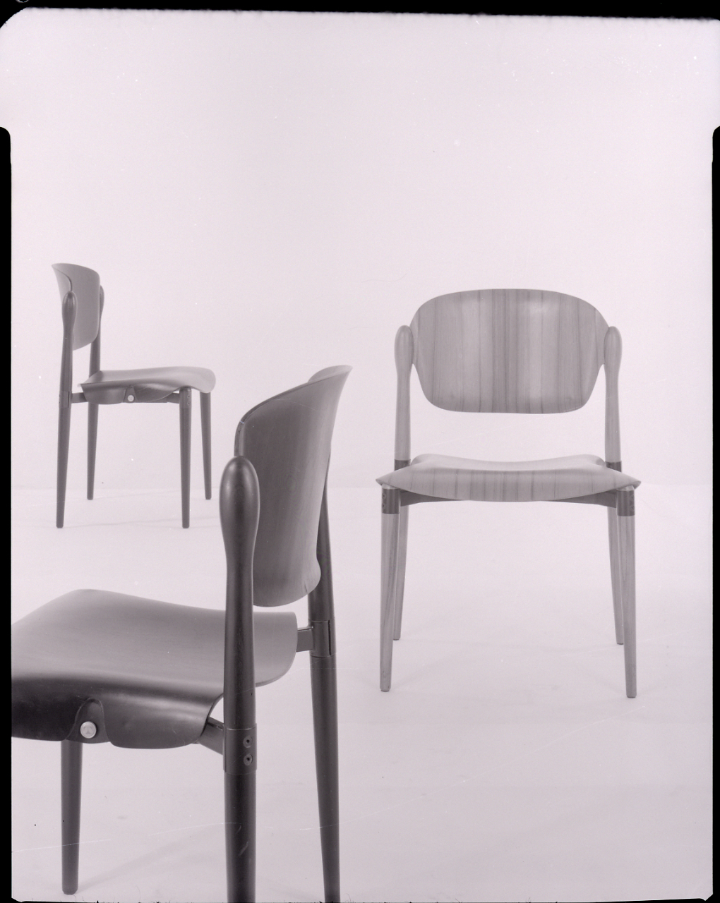 Sedute Tecno, S83, design Eugenio Gerli. Servizio fotografico : Italia, 1963 / Paolo Monti. - Buste: 10, Fototipi: 10 : Negativo b/n, gelatina bromuro d'argento/ pellicola ; 10x12. - ((Serie costituita da 10 buste sciolte di negativi identificati con una doppia numerazione (da 45215 a 45225): 25105, 25106, 25107, 25108, 25109, 25110, 25111, 25112, 25113, 25114, 25115. - La doppia numerazione potrebbe corrispondere ai lavori realizzati durante il periodo di attività del laboratorio e studio fotografico "Foto Studio 22", società che risulta essere stata aperta il 10/04/1961, con partecipazione, nel ruolo di gerente, di Vincenzo Carrese. - Fonte: Rubrica di Paolo Monti: Archivio fino 1-4-1961/ 31-3-1963 (1961-1963), presso Archivio Paolo Monti